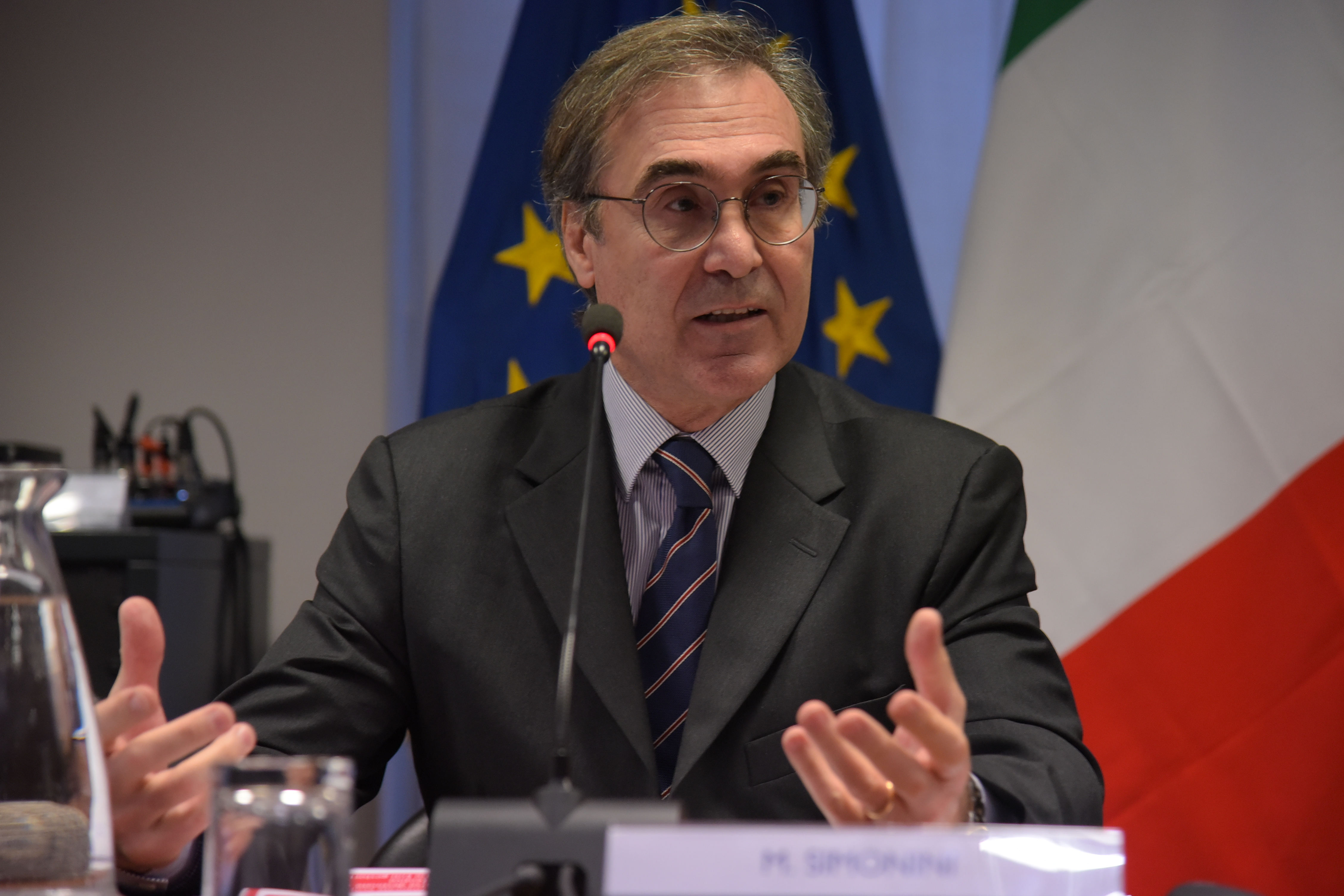 Massimo Simonini (Roma, 17 gennaio 1963) è un dirigente d'azienda italiano.